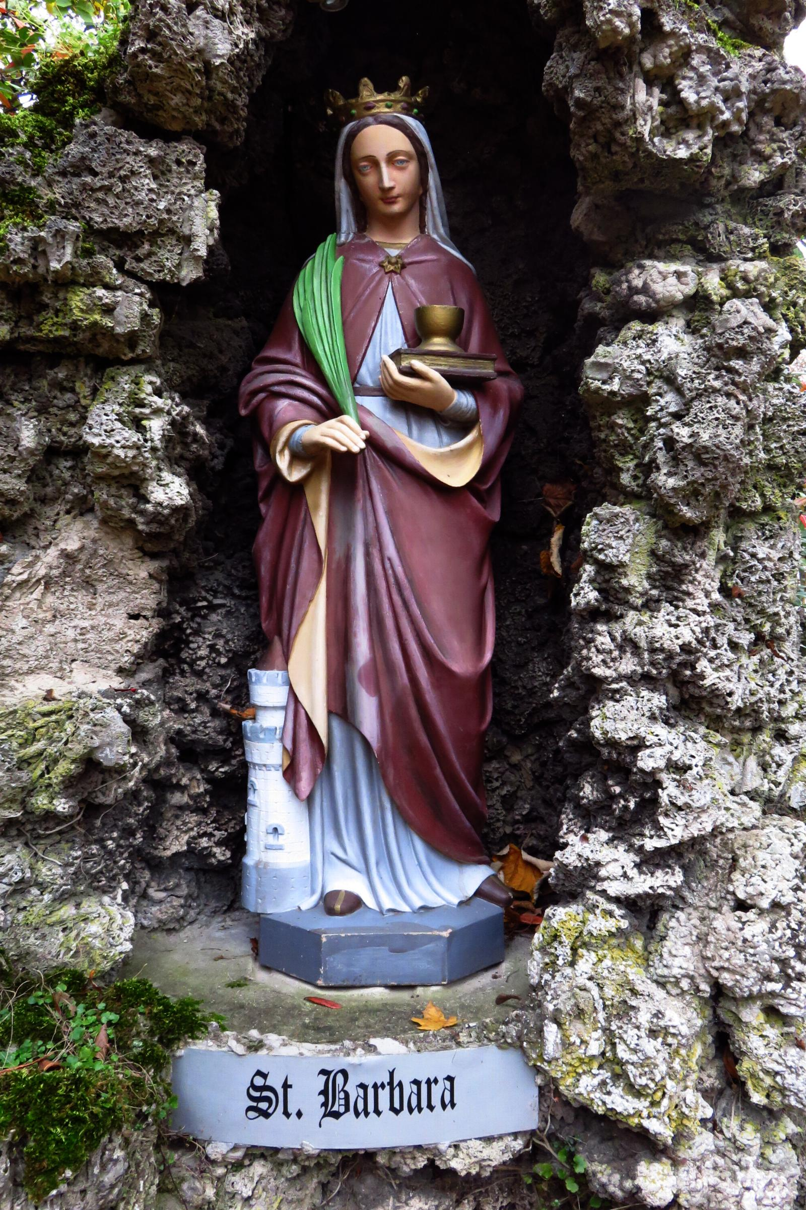 Grottenanlage in Hehn Heiligenpesch / Christliche Figuren in Mönchengladbach